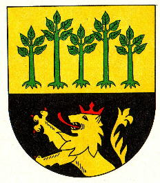 Wappen von Gimbweiler